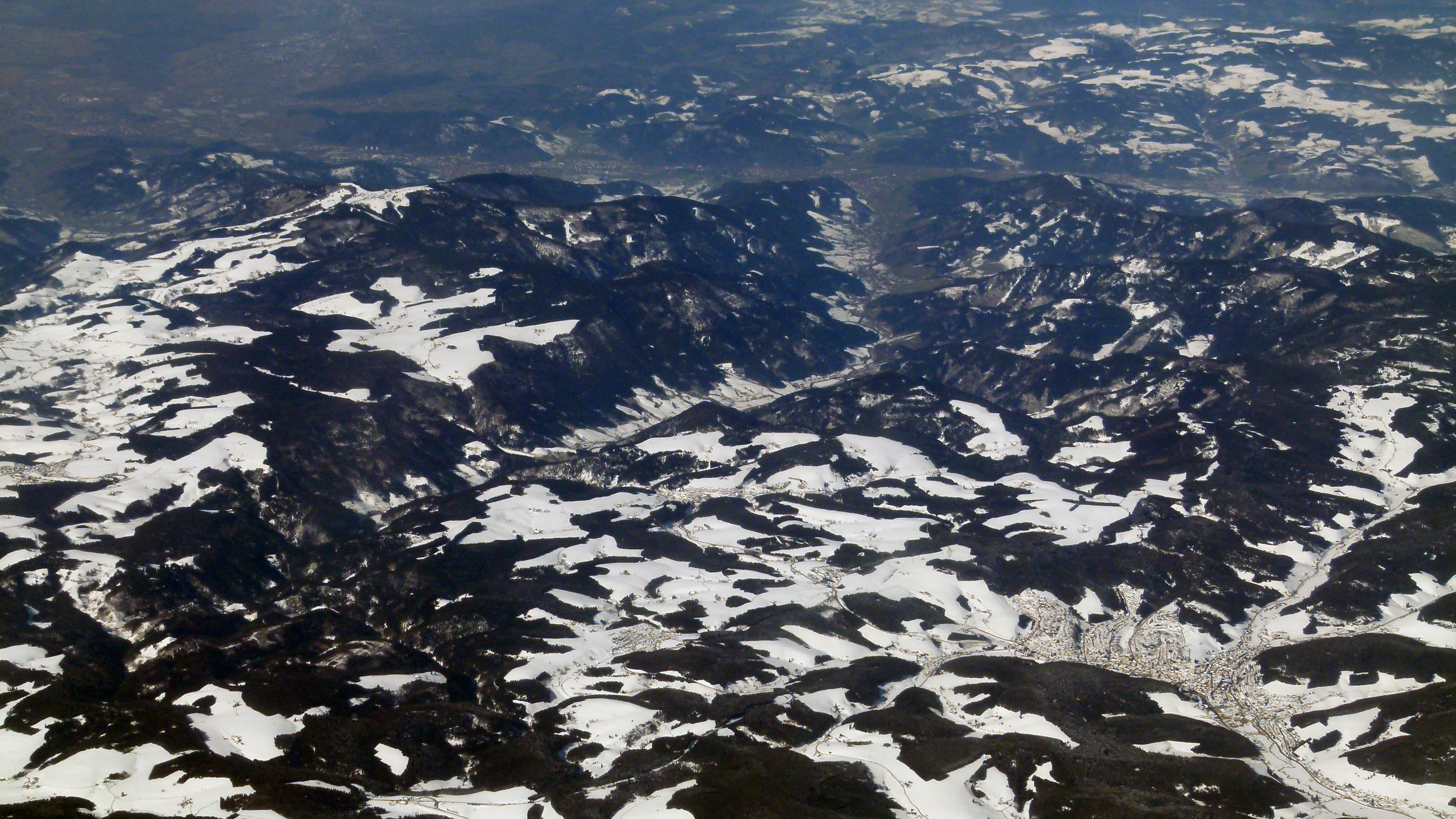 Blick aus dem Flugzeug auf den Berg Kandel bei Waldkirch (links) sowie auf Furtwangen im Schwarzwald (rechts unten), Mittlerer Schwarzwald